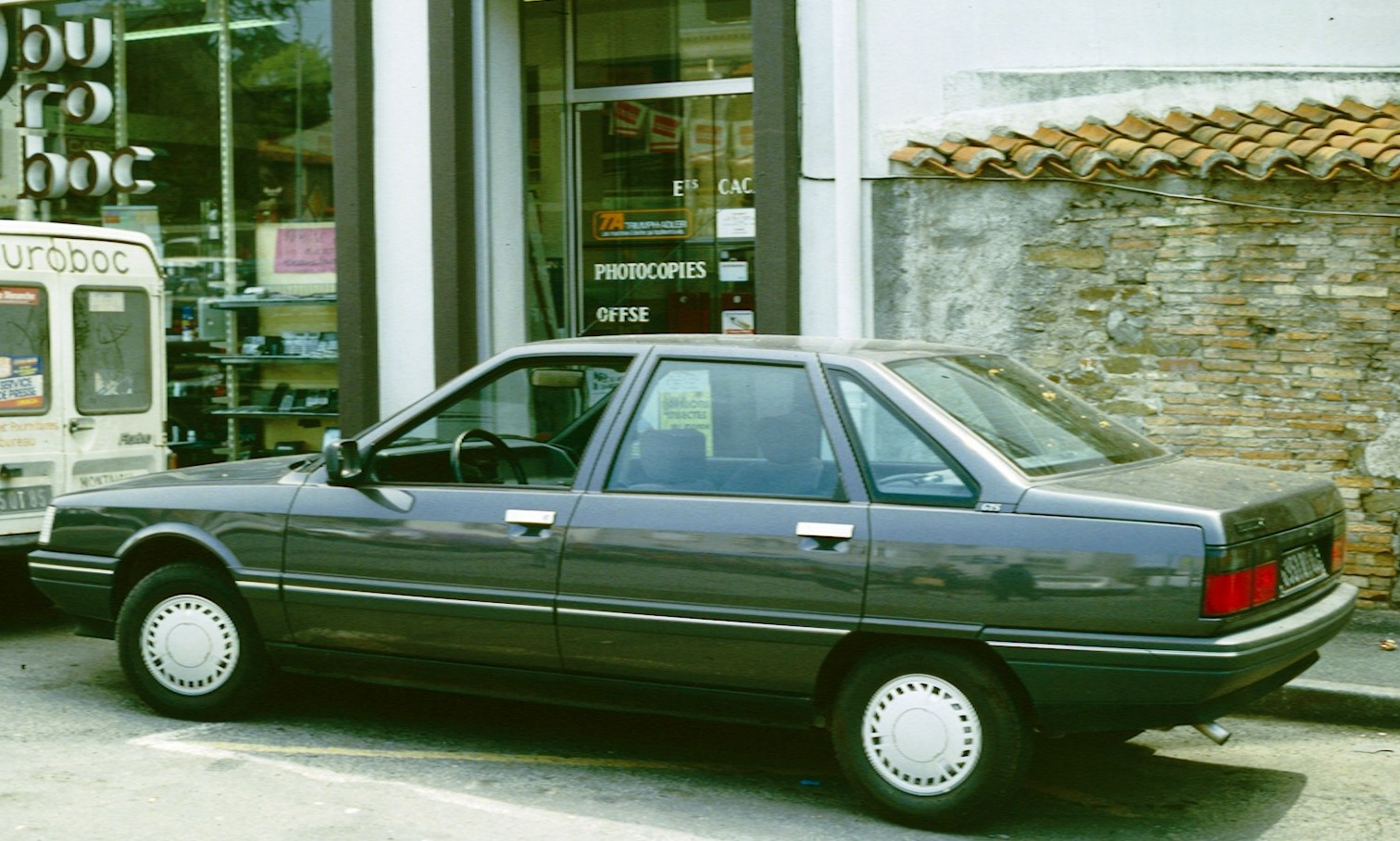 Renault 21 en Region Loire